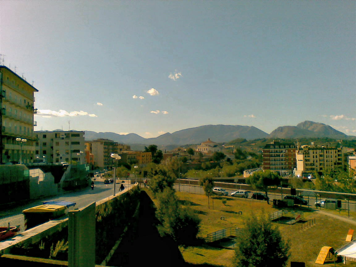 Panorama con la Dormiente del Sannio sullo sfondo.